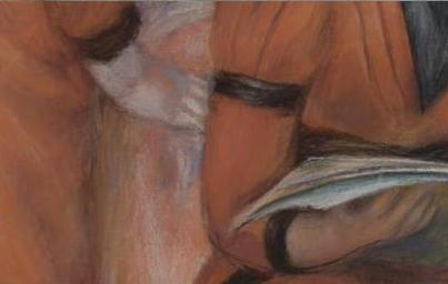 La Lecture